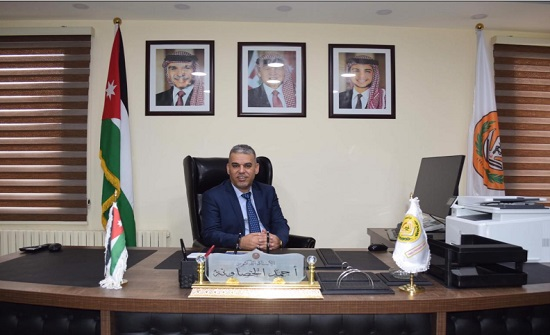 الدكتور أحمد منصور الخصاونة رئيس جامعة إربد الاهلية حالياً